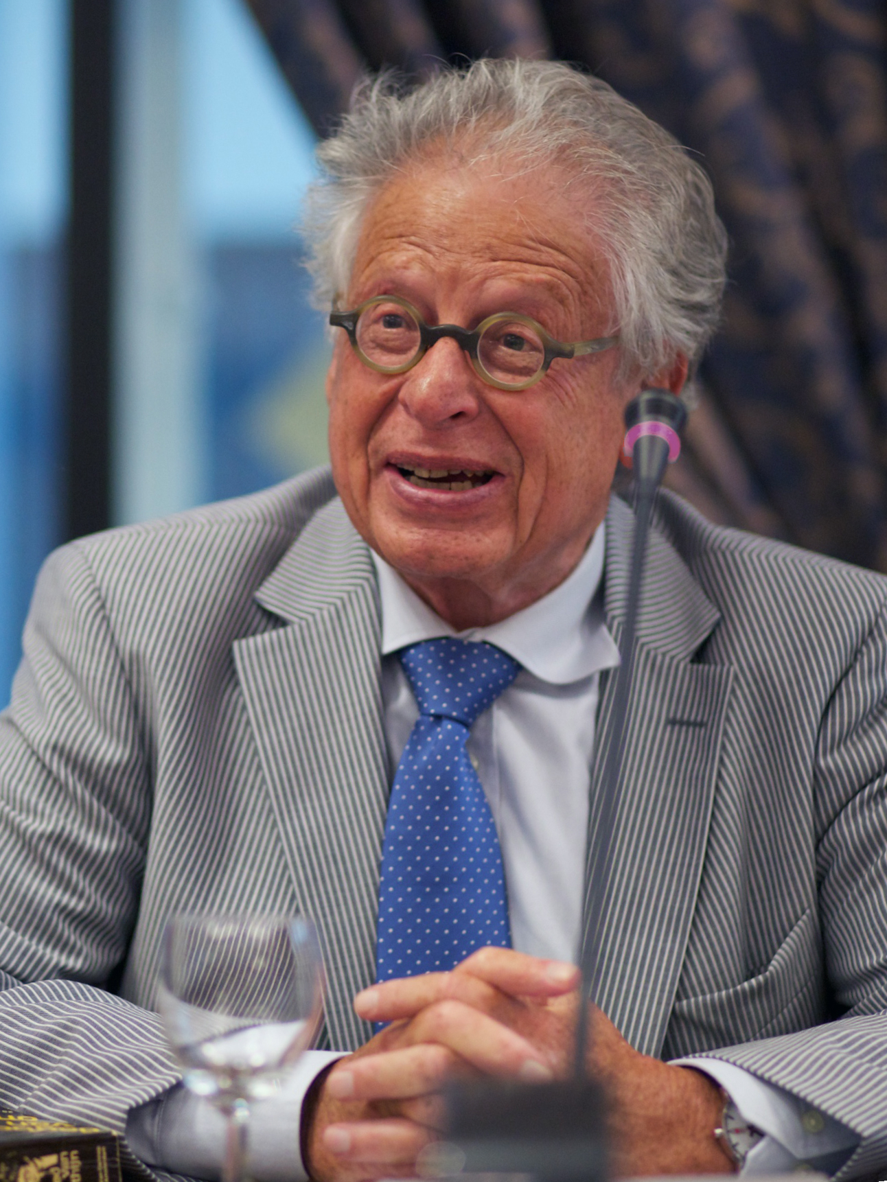 Ed van Thijn bij Nationaal Archief & Spaarnestad Photo join Wikipedia